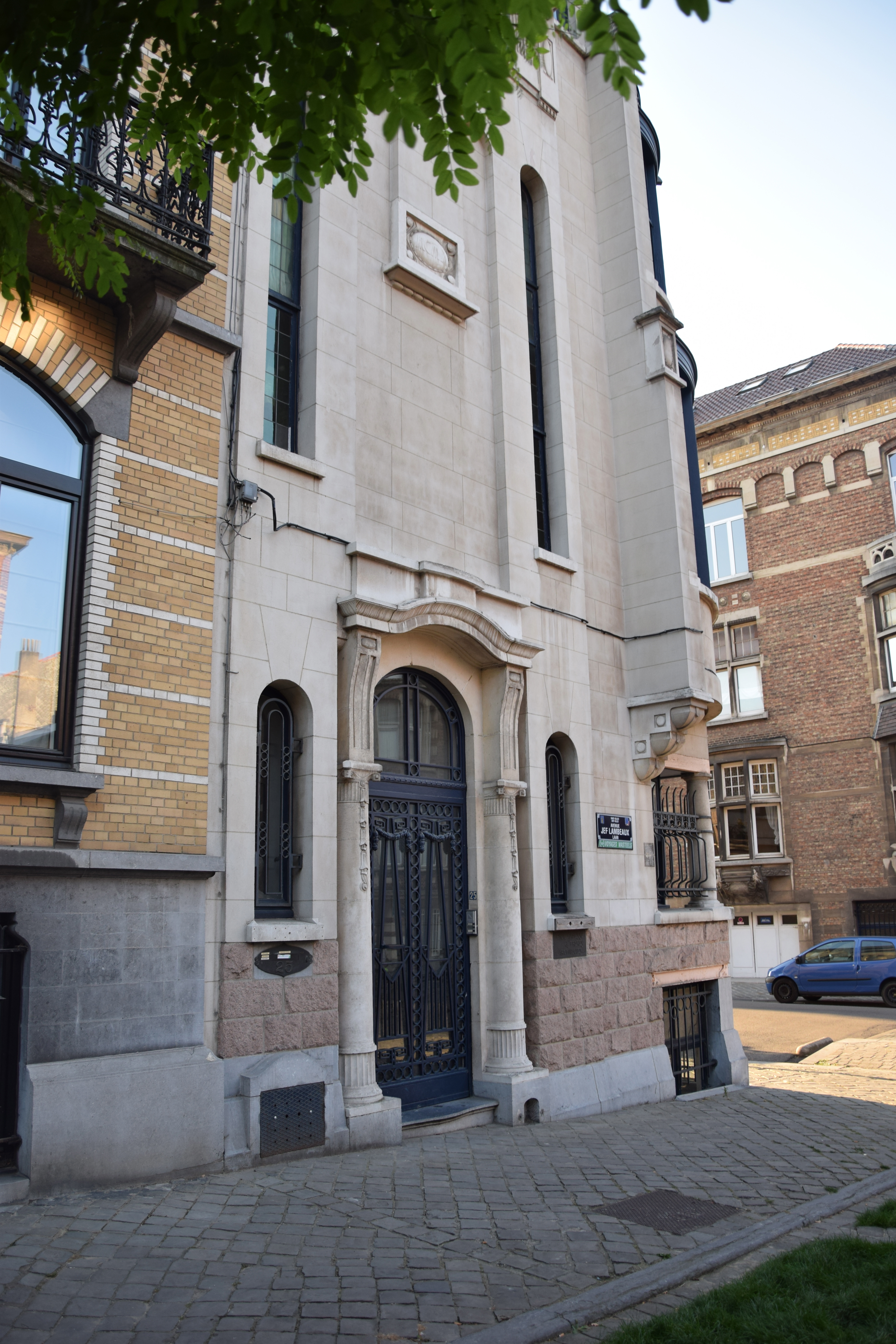 Eigen huis van architect Paul Hamesse (Arch. Paul Hamesse 1909) in Sint-Gillis, gefotografeerd in september 2016